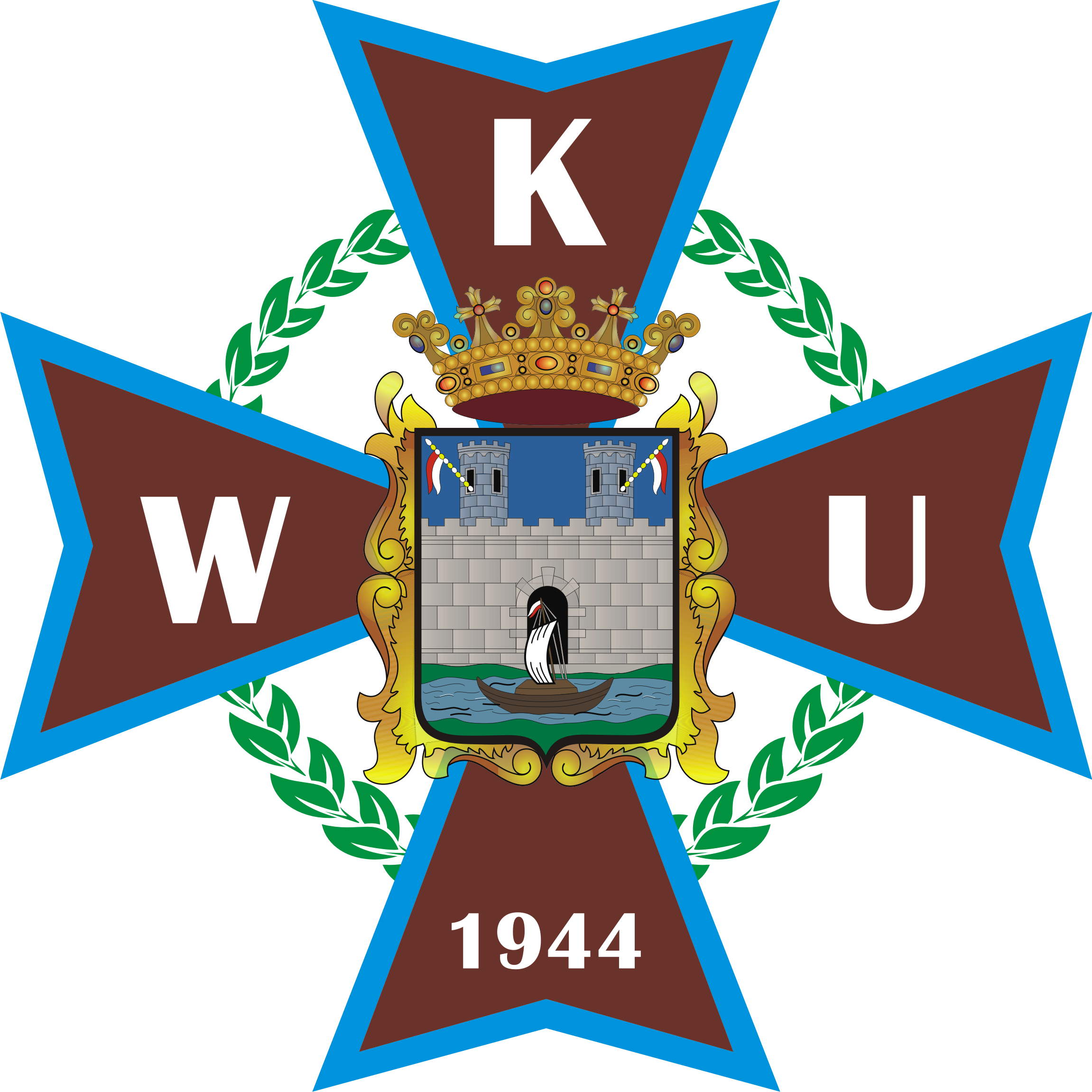 logo wku jarosław